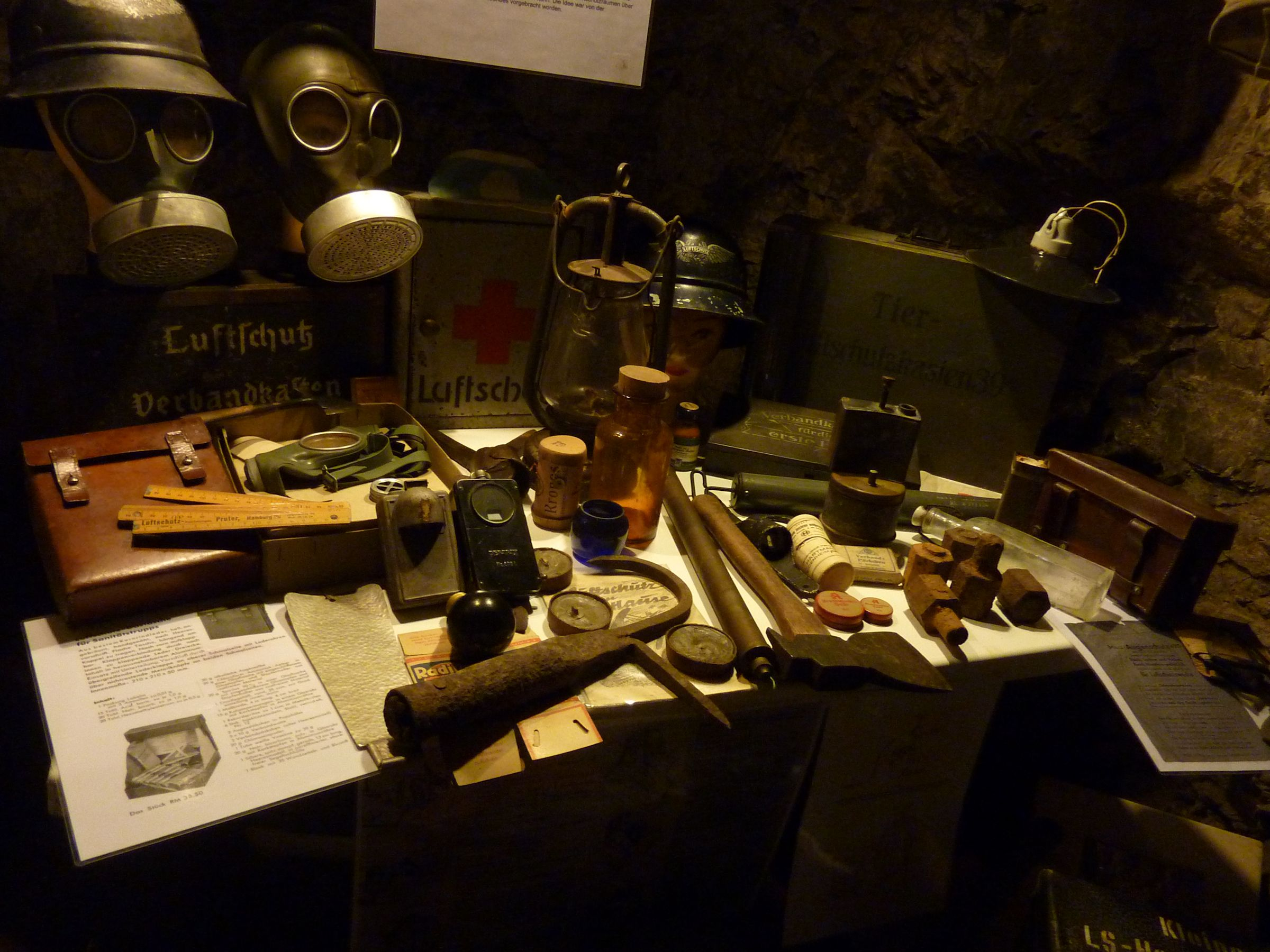 Ausstellungsstücke im Luftschutzstollen an der Gaishalde